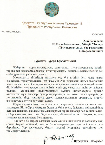 Письмо Президента Республики Казахстан Нурсултана Назарбаева Главному редактору журнала